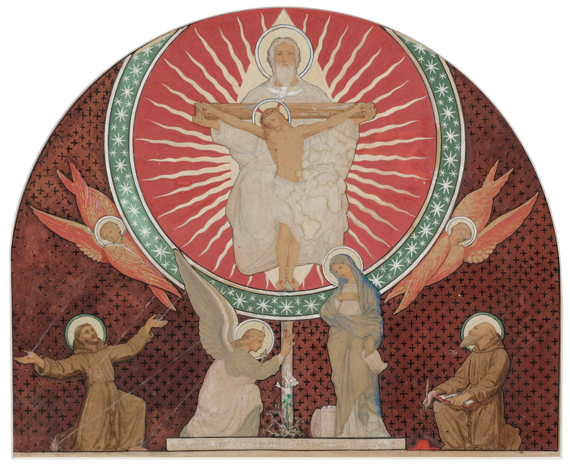 Die Heilige Dreieinigkeit. Entwurf für eine Wandmalerei. Feder in Schwarz, Gouache. Mit Bleistift quadriert. 27,4 x 32,7 cm (die obere Bildhälfte im Halbrund). In der Darstellung bezeichnet: All Reverend Pere Pierre Baptiste. Ant. Sublez Inv. MCCCDLXVIII.